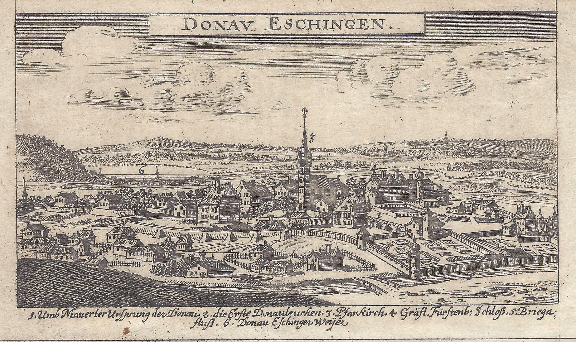 Donaueschingen, Ansicht um 1680, Kupferstich